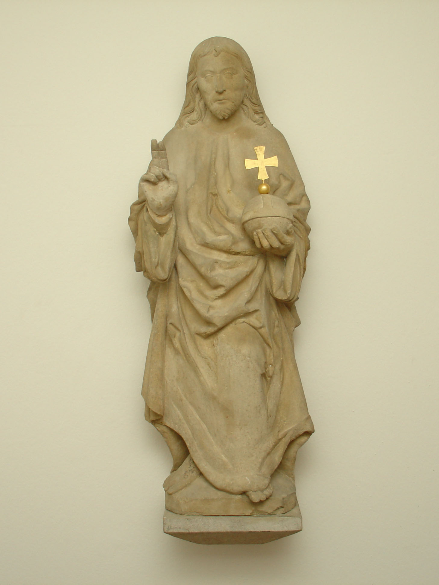 Christusfigur von Evert van Roden. Ursprünglich vom Lettner des Klosters Marienfeld, heute in der St. Marienkirche im Franziskanerkloster Wiedenbrück